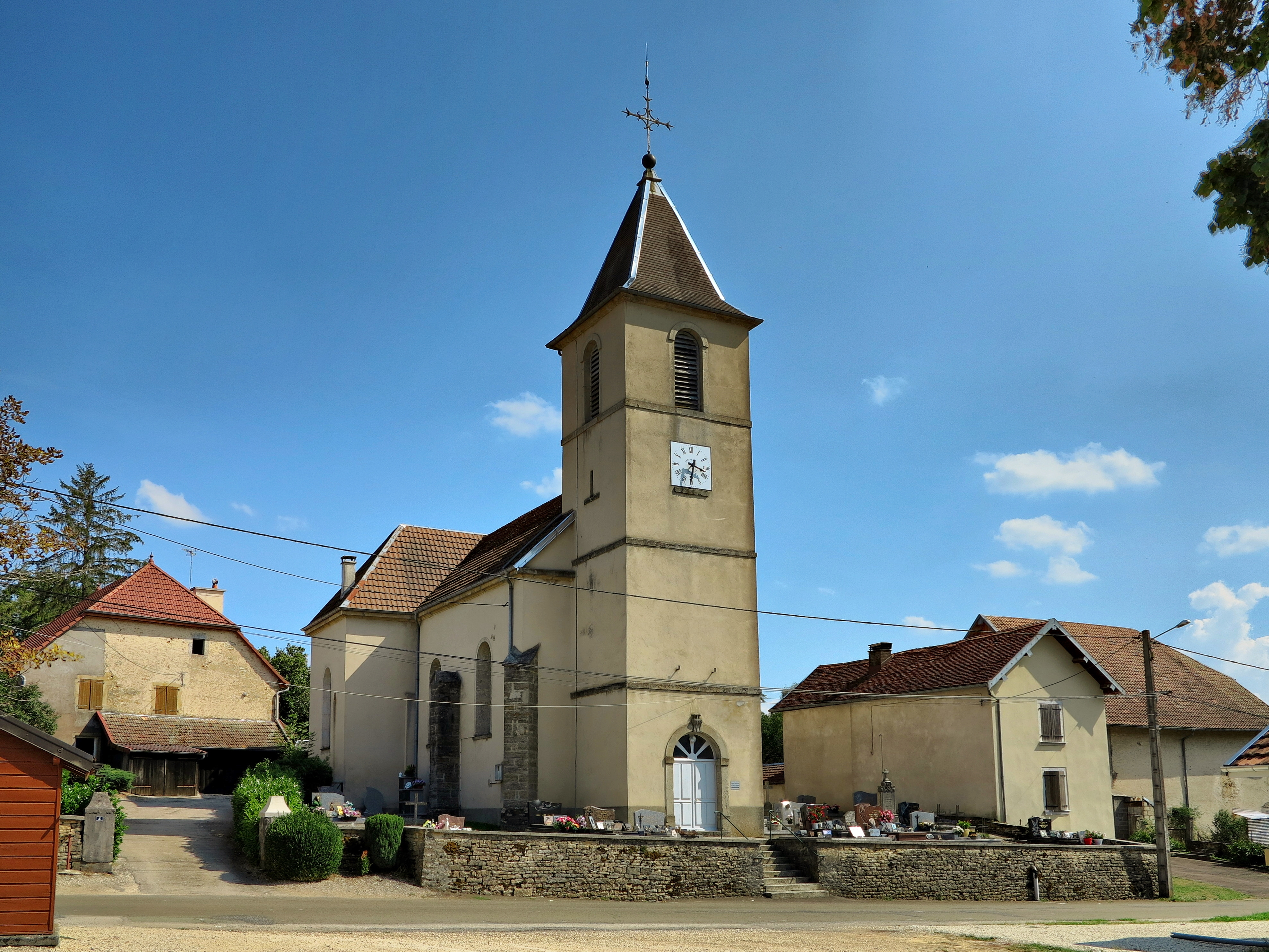 L'église